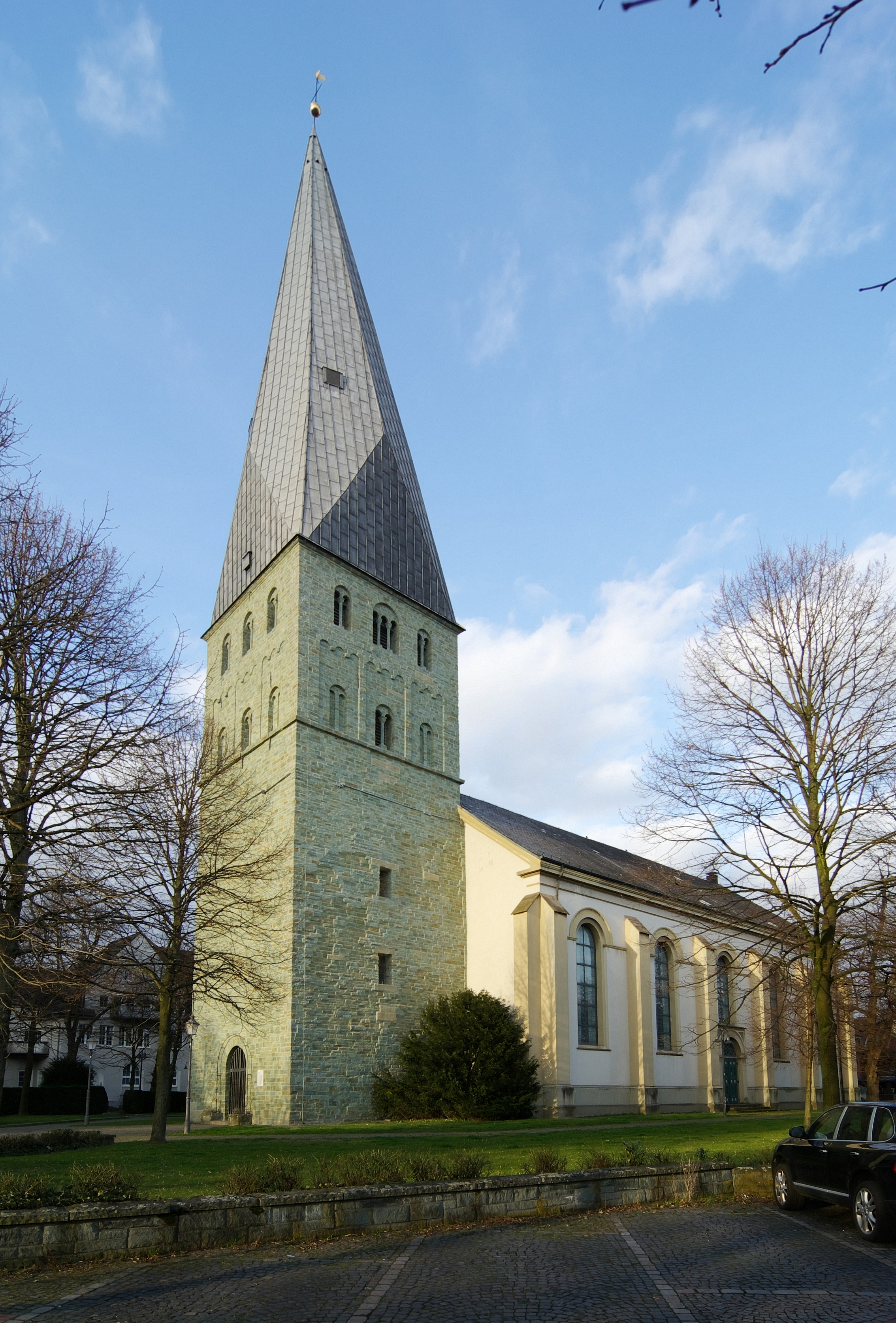 Kamen